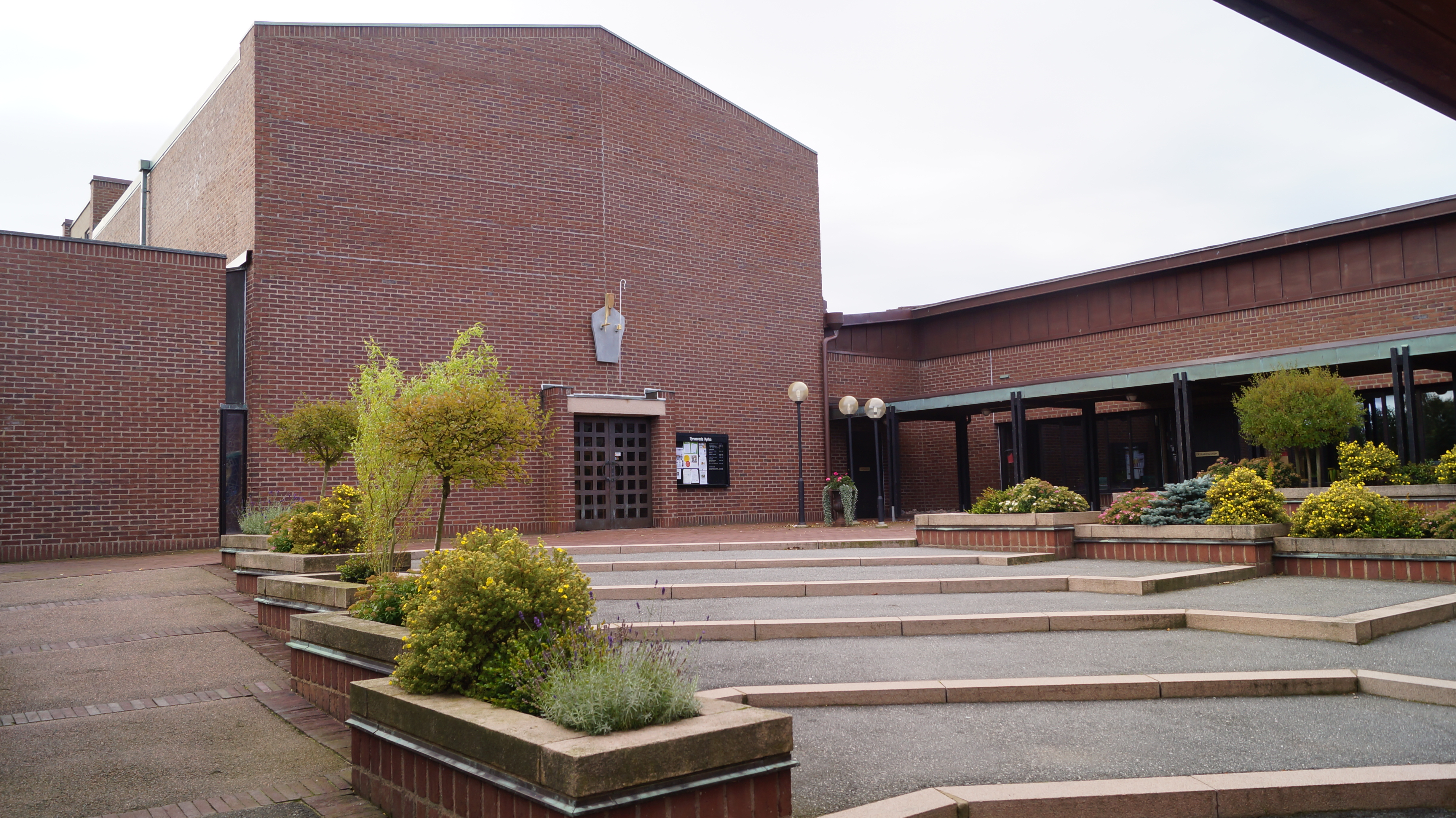 Tynnereds kyrka (Tynnered 11:1) Västra Frölunda